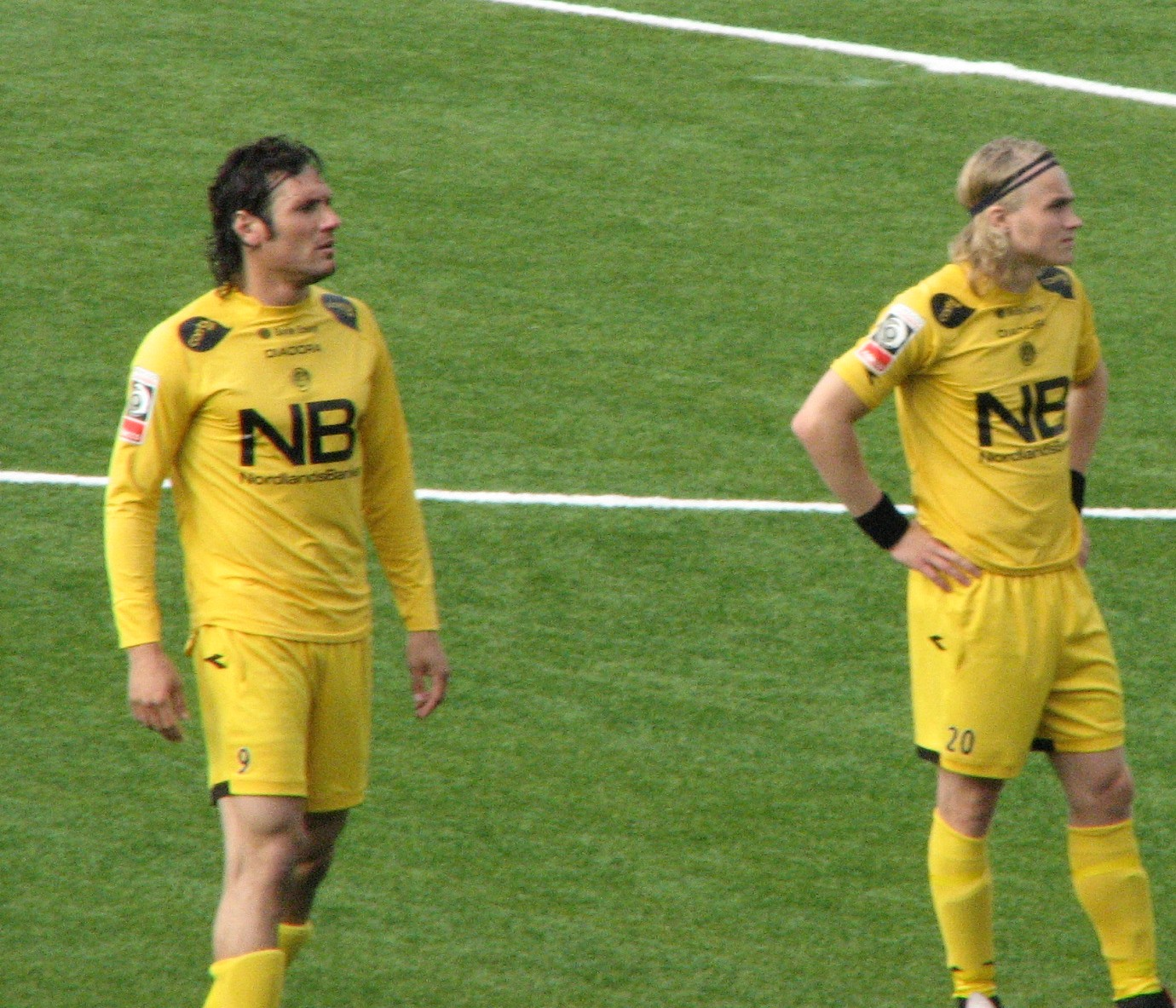 Thiago Martins og Trond Olsen (Glimt) under oppstillingen til BOdø/Glimt-Sogndal. To av de spillerene med flest mål i 1. divisjon 2007